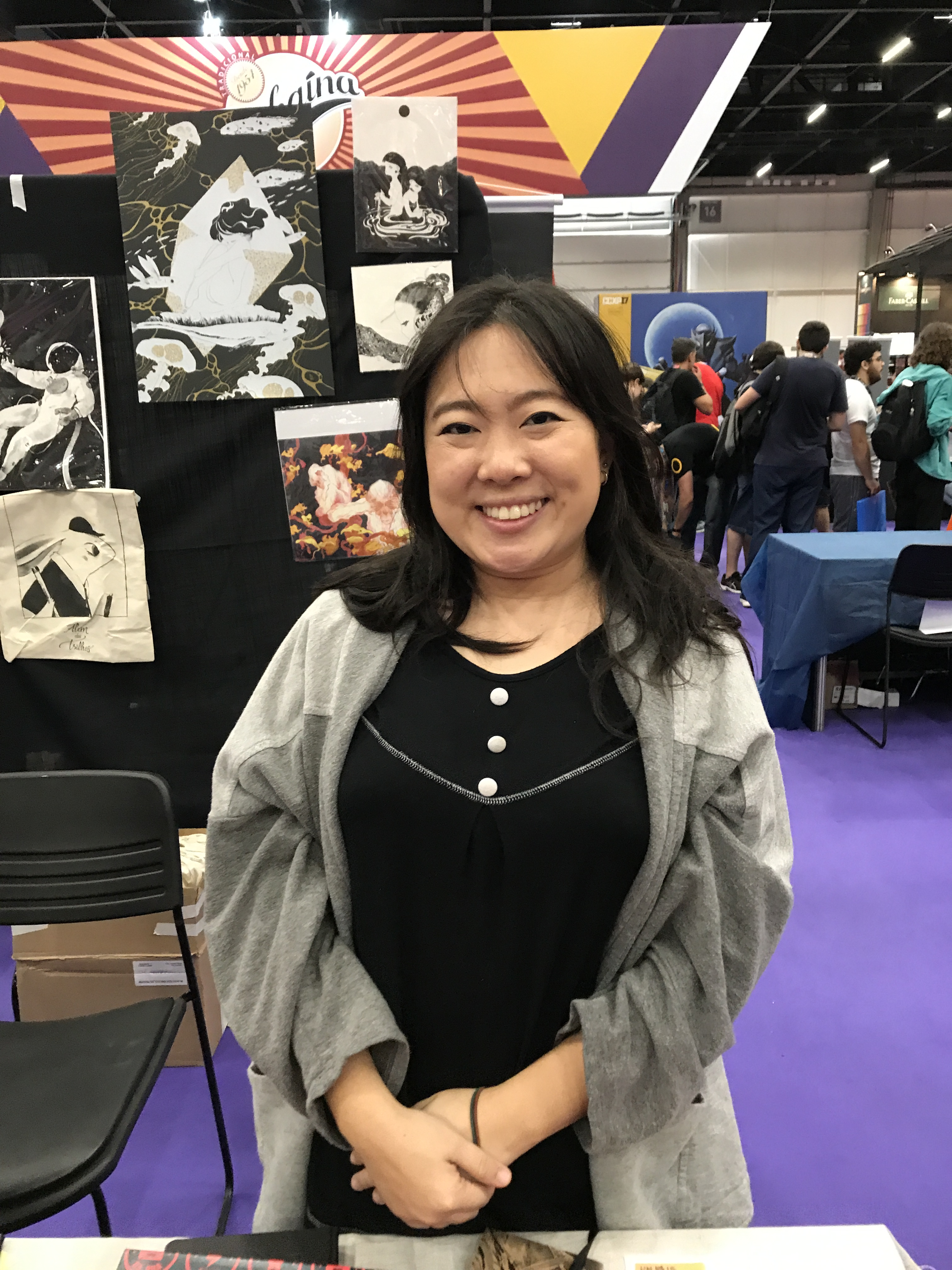 Artista Mika Takahashi na edição de 2017 da Comic Con Experience